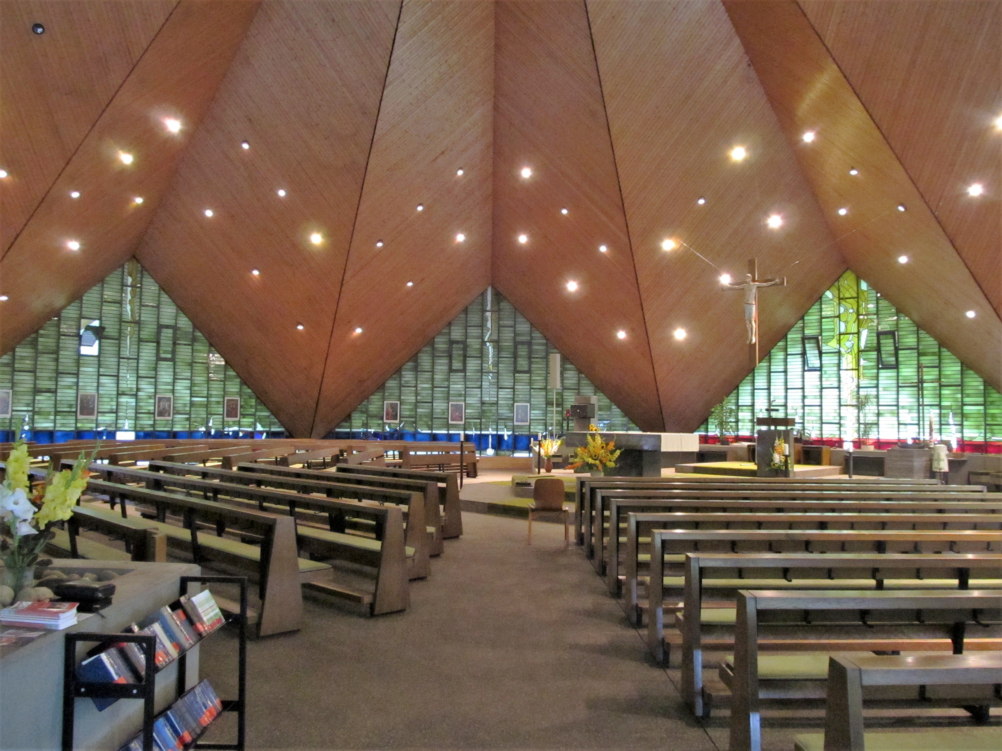 Blick ins innere der katholischen Pfarrkirche St. Michael in St. Ingbert, Saarland